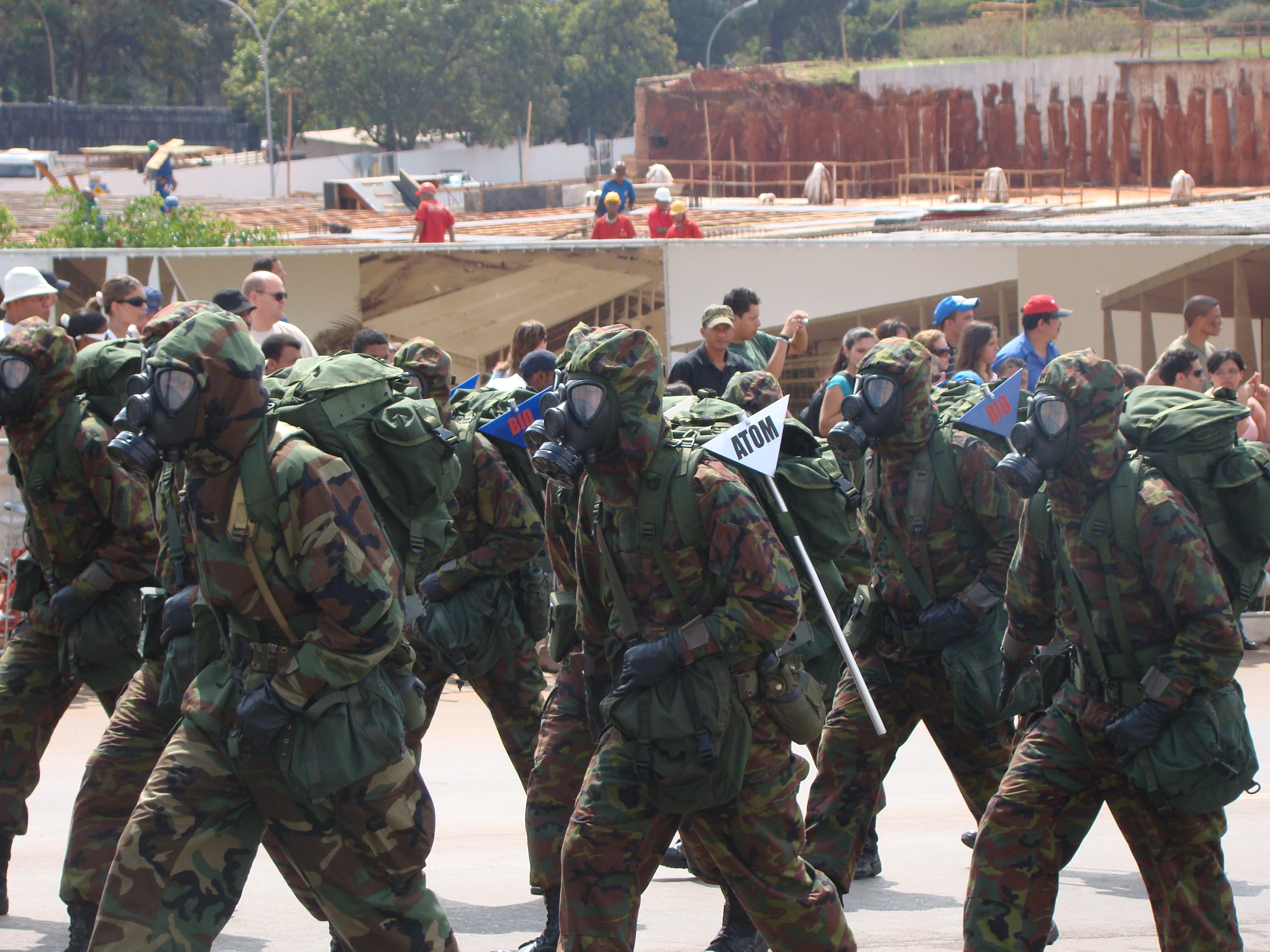 Companhia de Defesa Química, Biológia e Nuclear